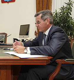 Александр Жилкин